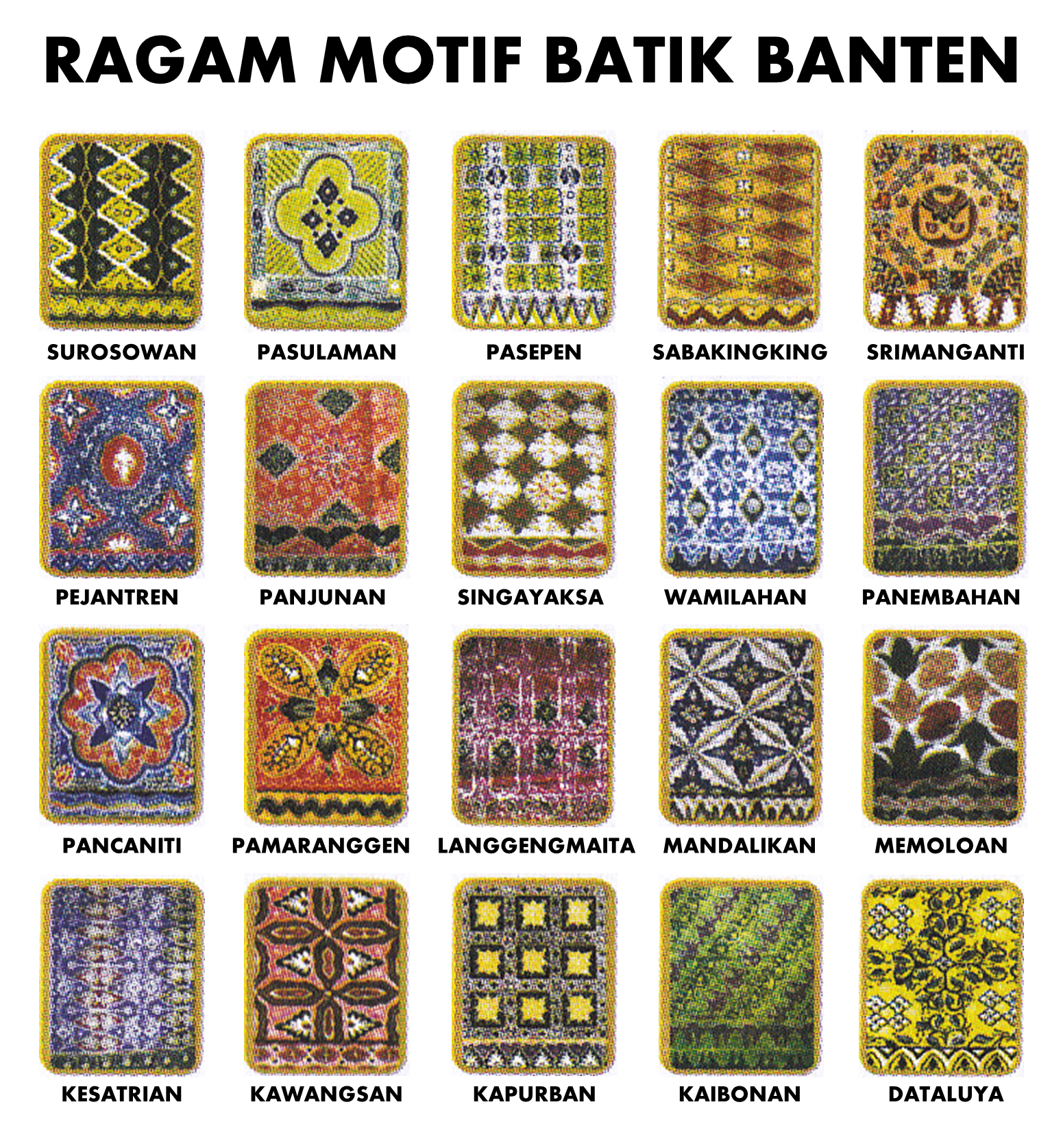 Ragam motif batik khas Banten